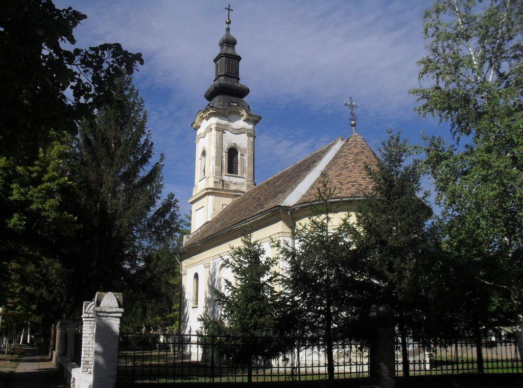 Храм СПЦ Преноса моштију Св. оца Николаја, Вогањ